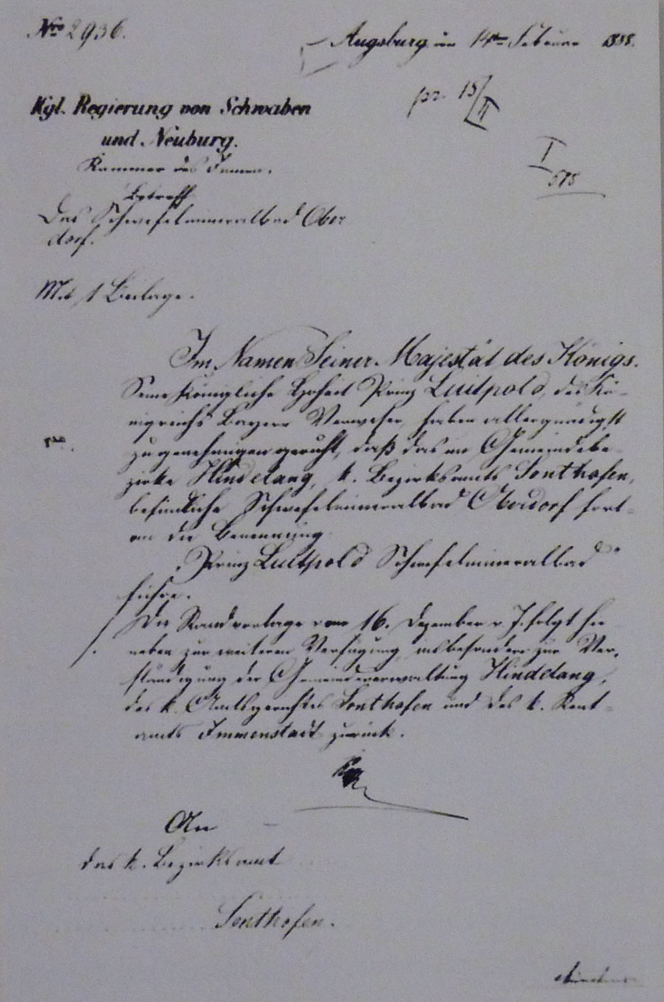 Prinzregent Luitpold erlaubt die Führung des Namens "Prinzregent-Luitpold-Schwefelmineralbad"